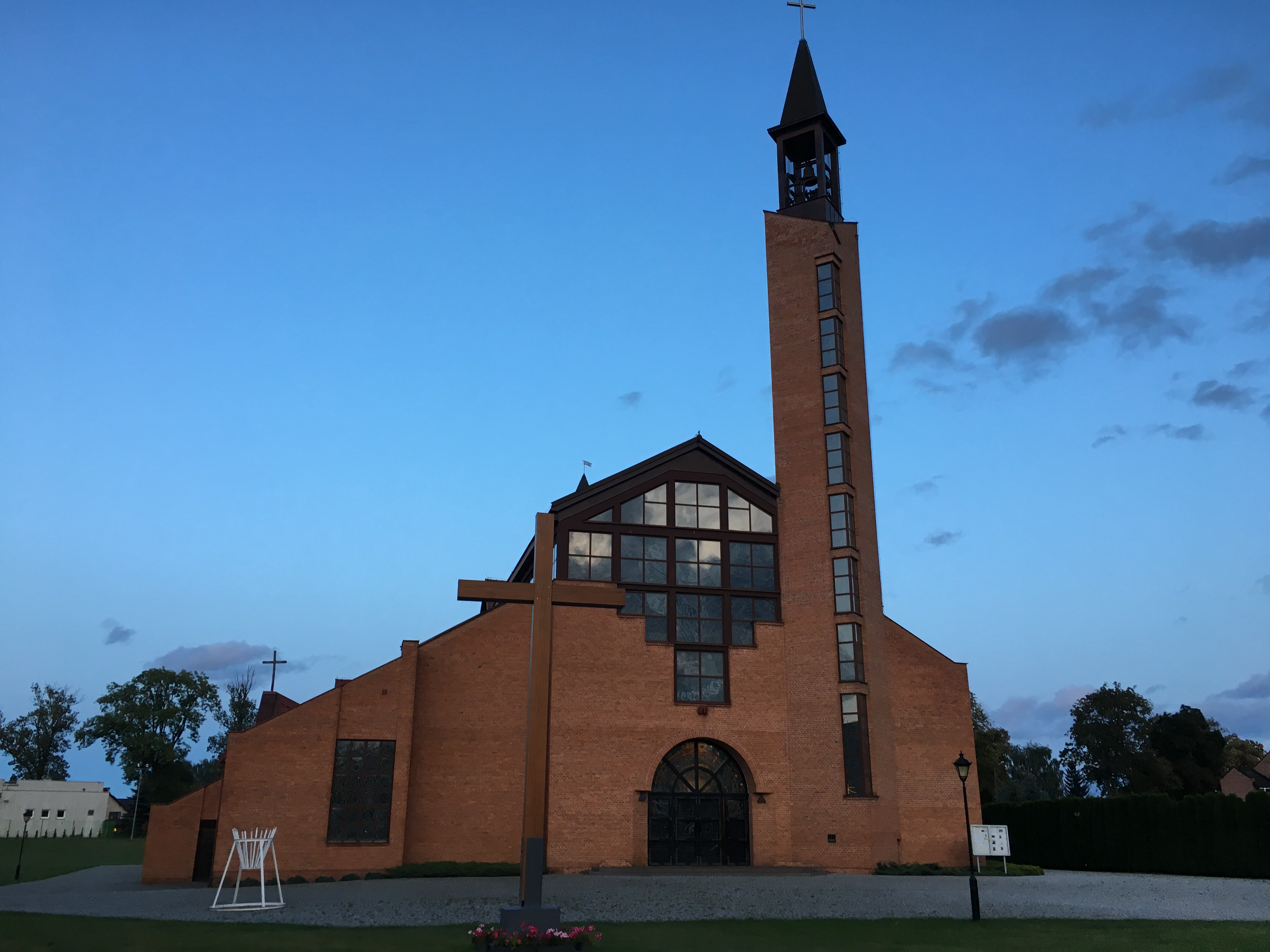 Kościół Najświętszej Maryi Panny Matki Kościoła w Starogardzie Gdańskim-Korytybie (pot. Nowej Wsi)